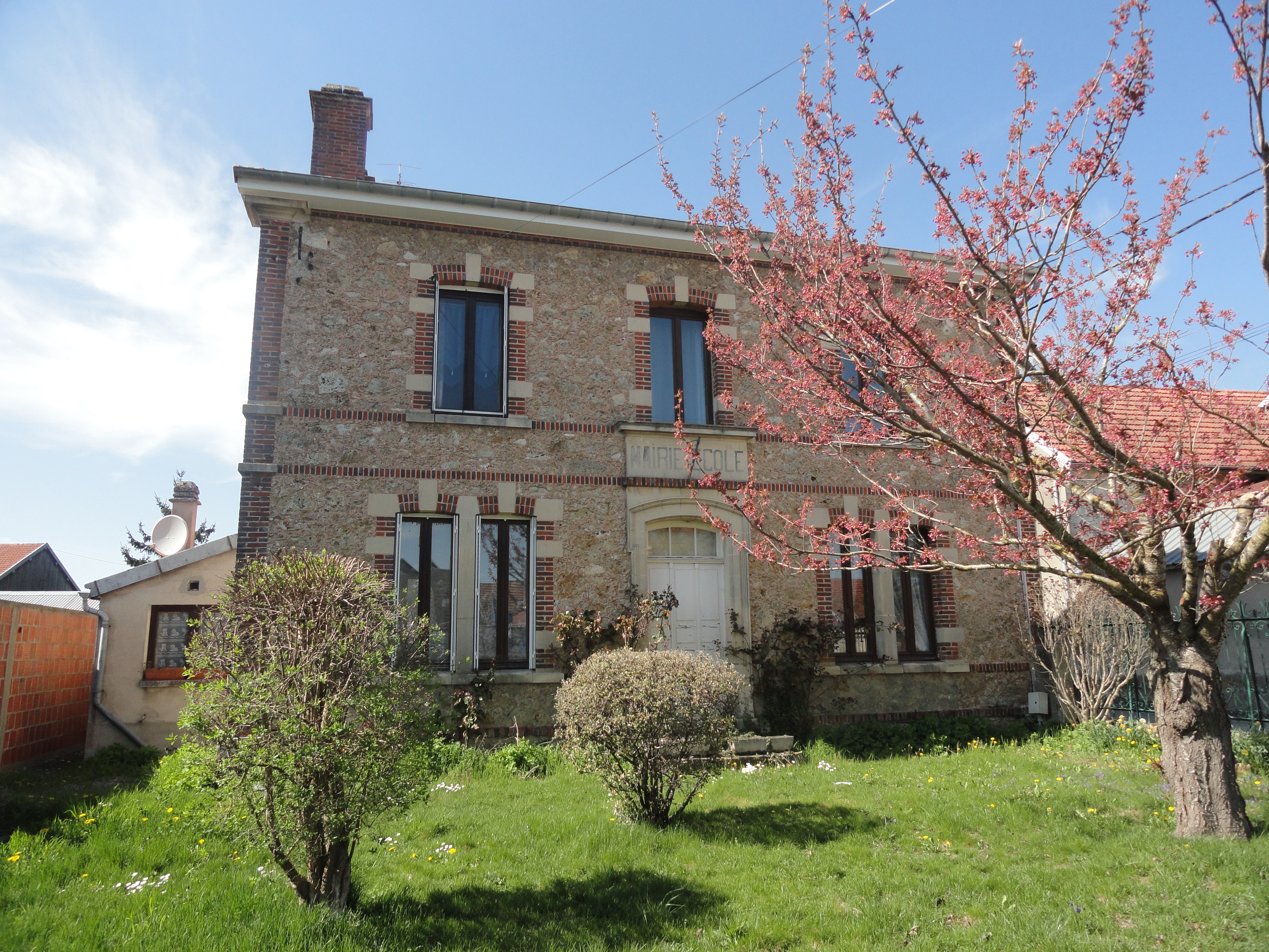 La mairie de Rouffy (Marne, France).